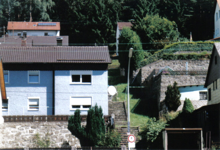 private Wohnhäuser auf dem Gelände des Konzentrationslager Flossenbürg